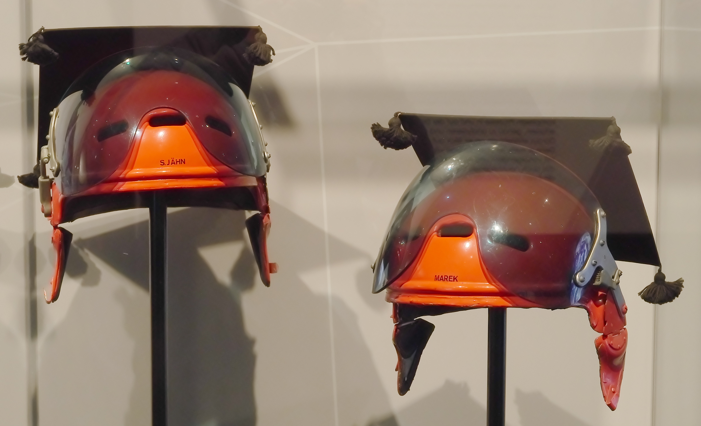 Doktorhüte aus Fliegerhelmen der Nationalen Volksarmee von Sigmund Jähn und Karl-Heinz Marek von 1983, Exponate der Ausstellung 2017 vom GeoForschungsZentrum Potsdam